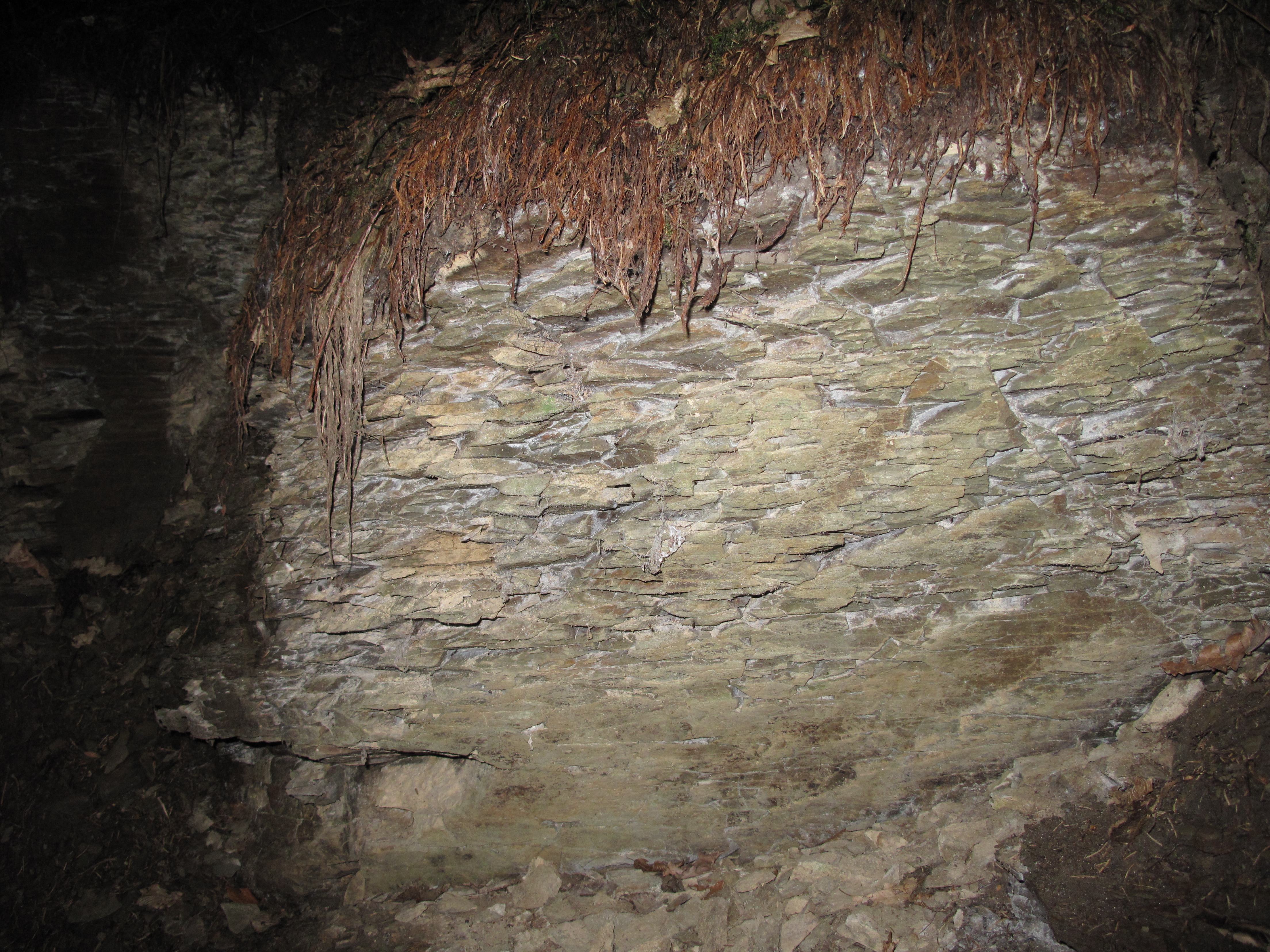 Přírodní památka Zavírka. Okres Rokycany, Česká republika.